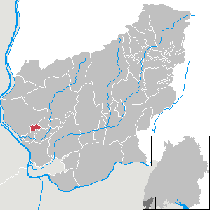 Fischingen, Landkreis Lörrach, Baden-Württemberg